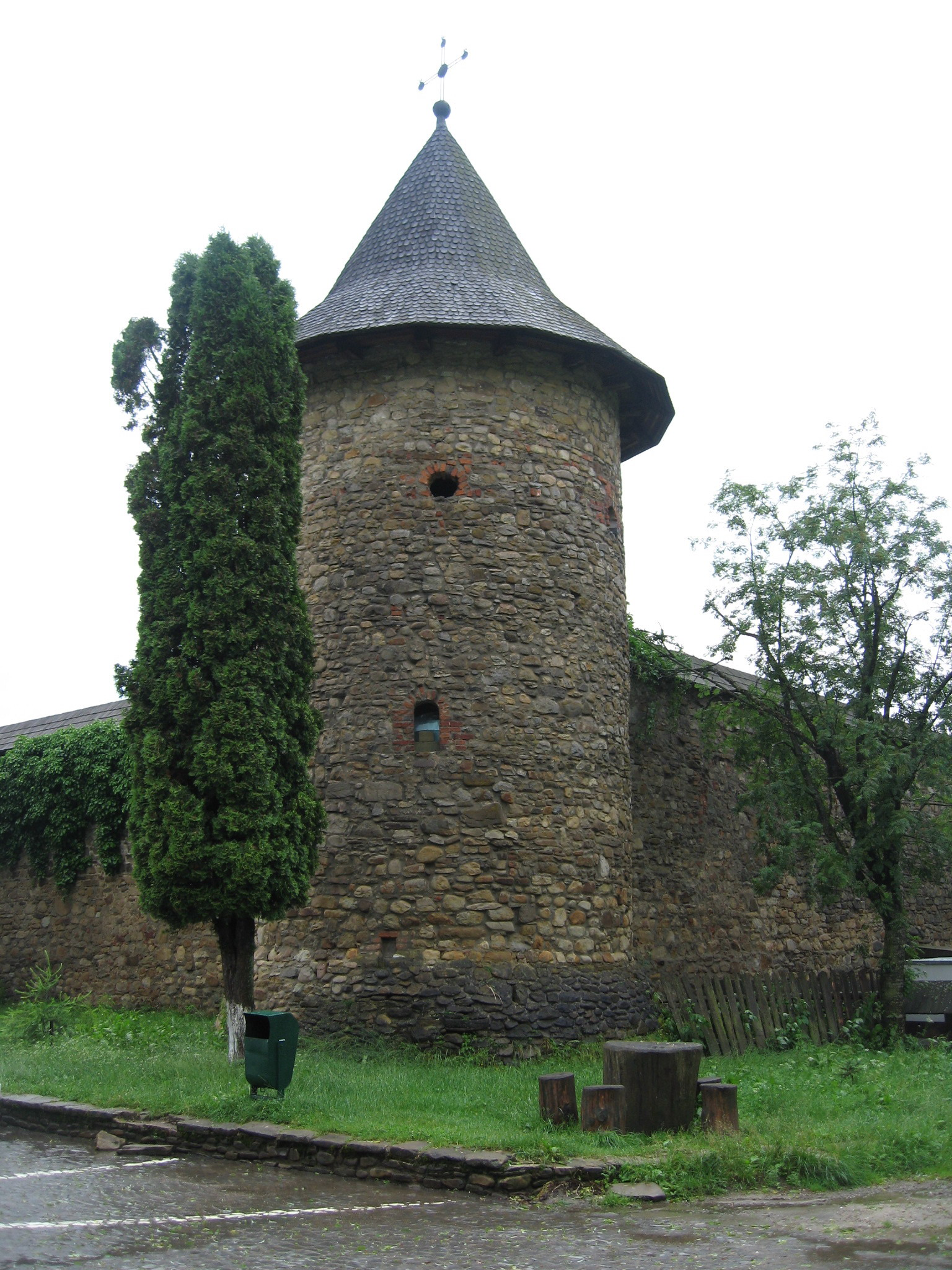 Mănăstirea Moldovita